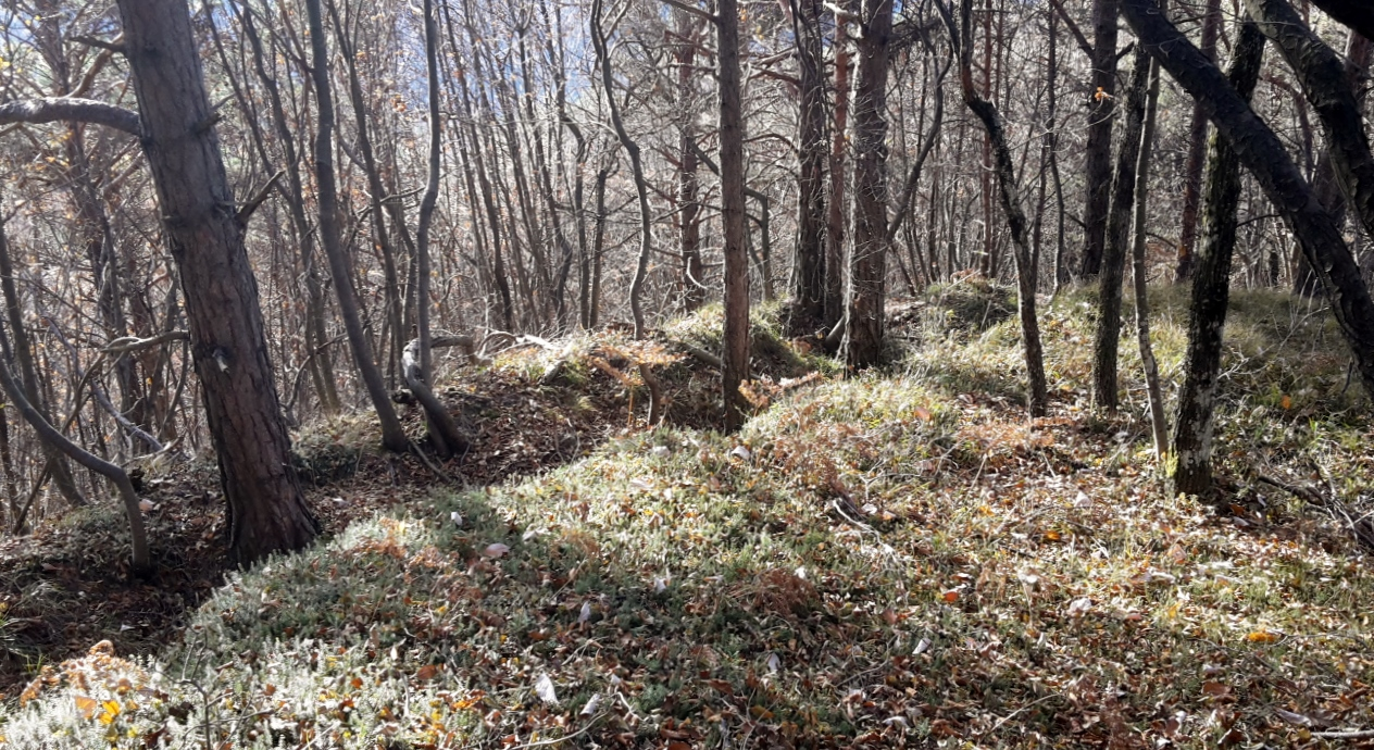 Forte Brusafer